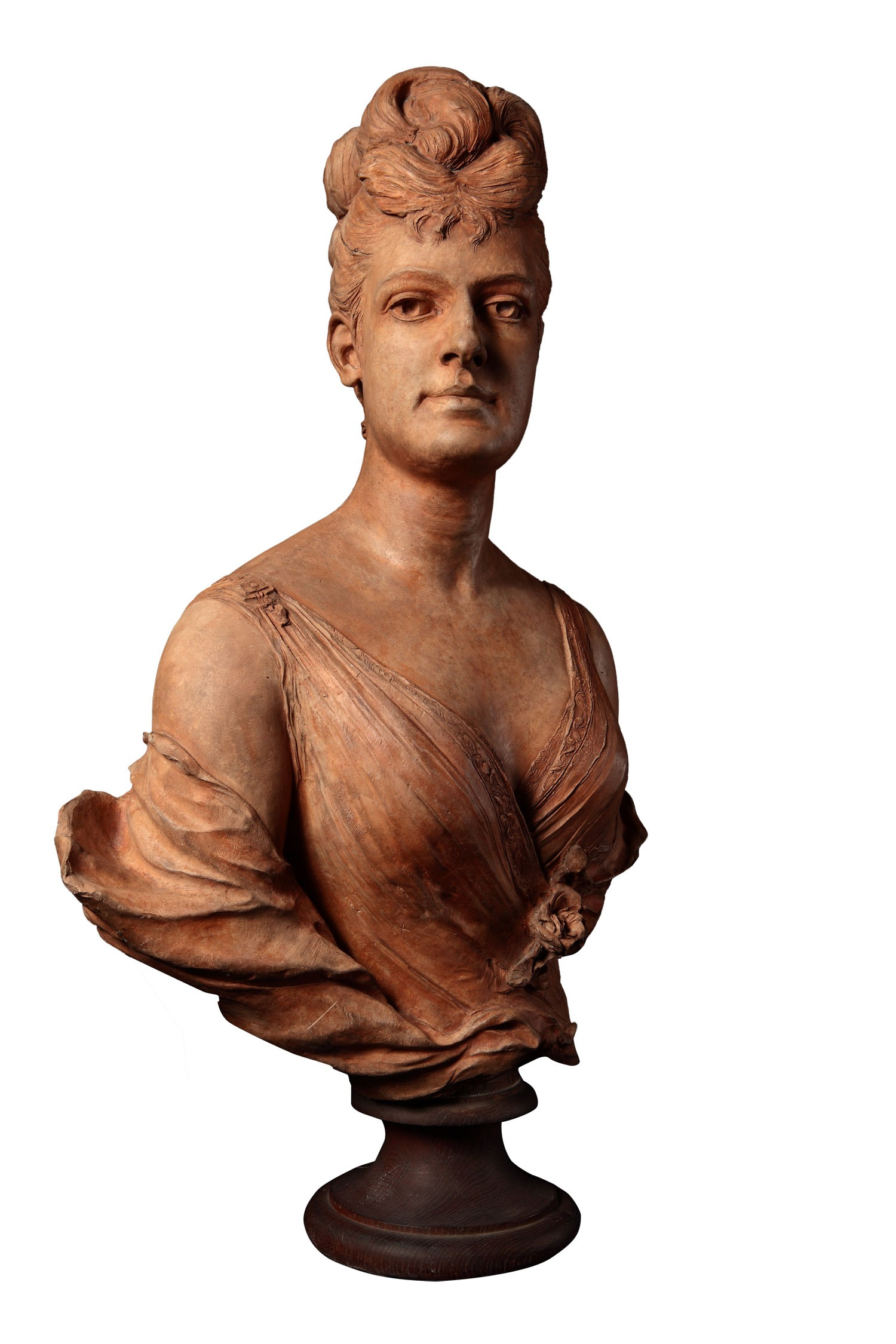 Tony Noël, Retrato de la Señora Amalia Peña de Dormal. 1888. 75 cm, terracota . Inv. 2938.